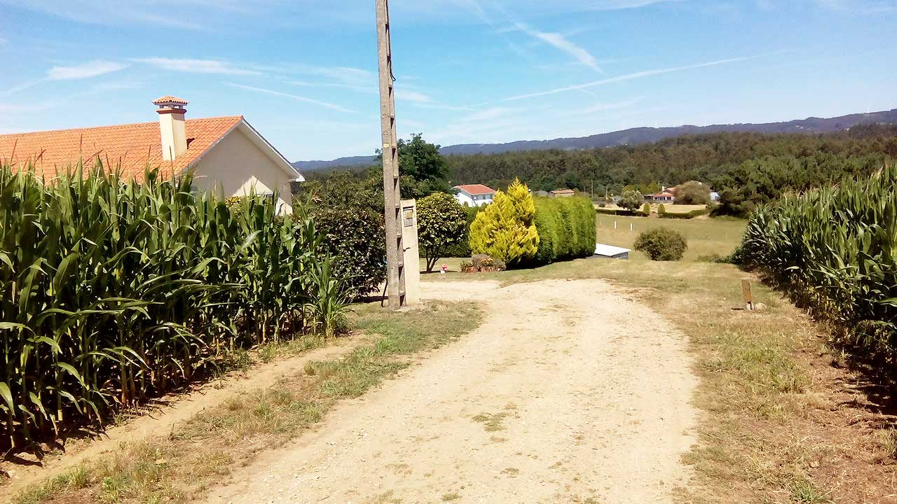 Vista do Cádavo, O Val.